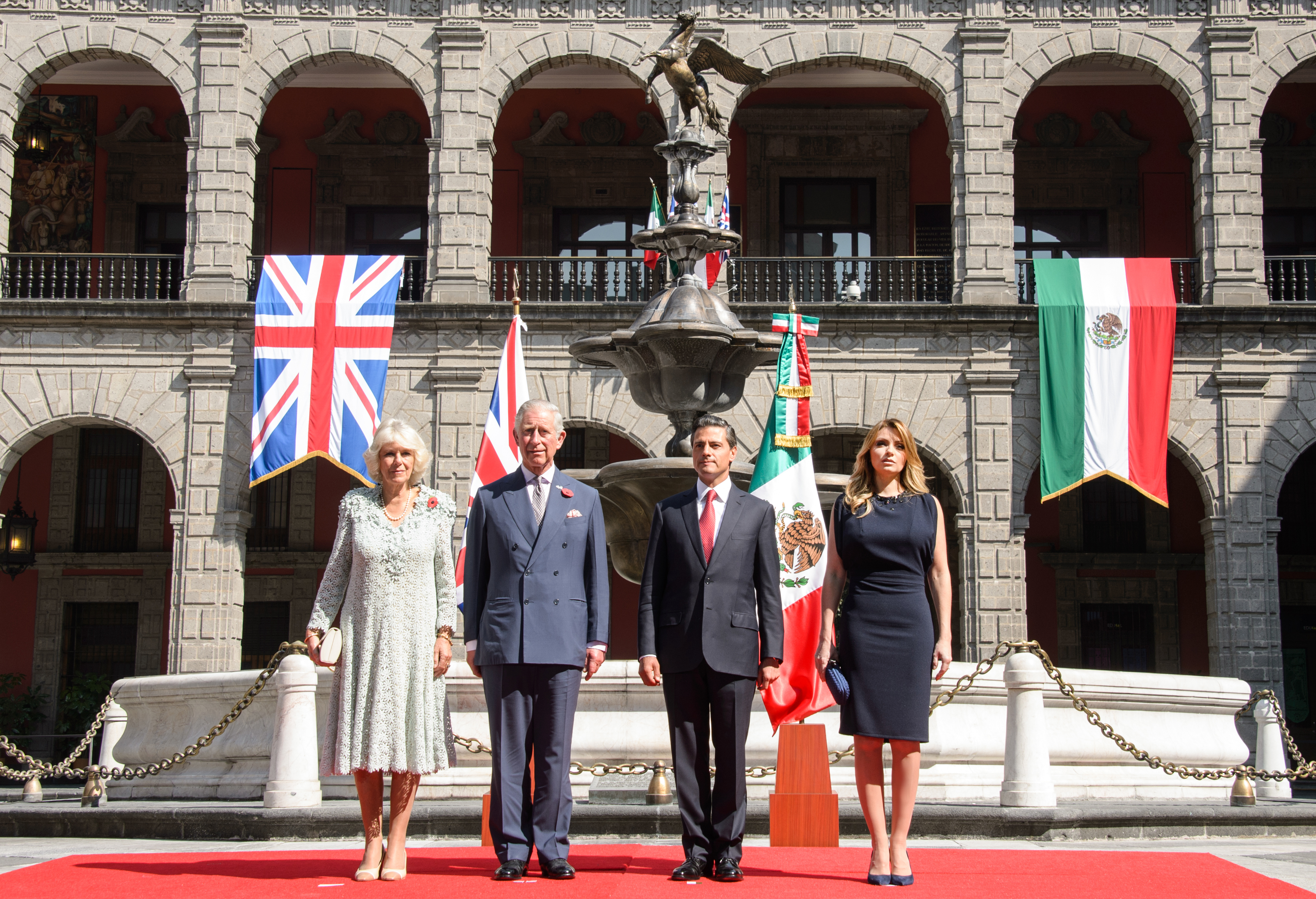 Visita Oficial de SS. AA. RR. Carlos, Príncipe de Gales y Camila, Duquesa de Cornualles. Palacio Nacional, Ciudad de México. 03 de noviembre de 2014.